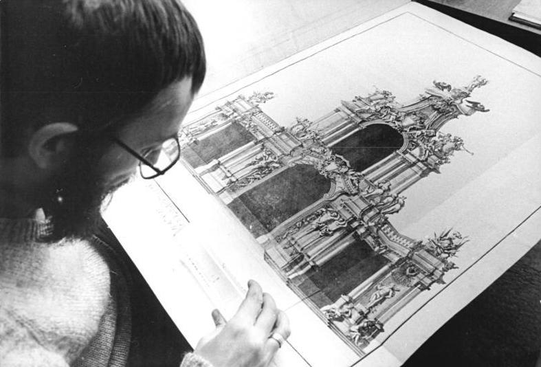 Pöppelmanns Entwürfe zum Dresdner Zwinger ADN-ZB Grubitzsch 21.1.87 Leipzig: Saxonia-Bestand in der Stadt- und Bezirksbibliothek- Über einen wertvollen Fundus verfügt die Stadt- und Bezirksbibliothek der Messestadt. In über 7.000 Bänden wird die Geschichte des ehemaligen Königreiches und späteren Landes Sachsen sowie die Geschichte der sächsischen Provinzen dokumentiert. In diesem Fundus sind auch Pöppelmanns Entwürfe für den Dresdner Zwinger, hier ein Kupferstich aus dem Jahre 1729, enthalten. - siehe auch 1987-0121-14 und 16N